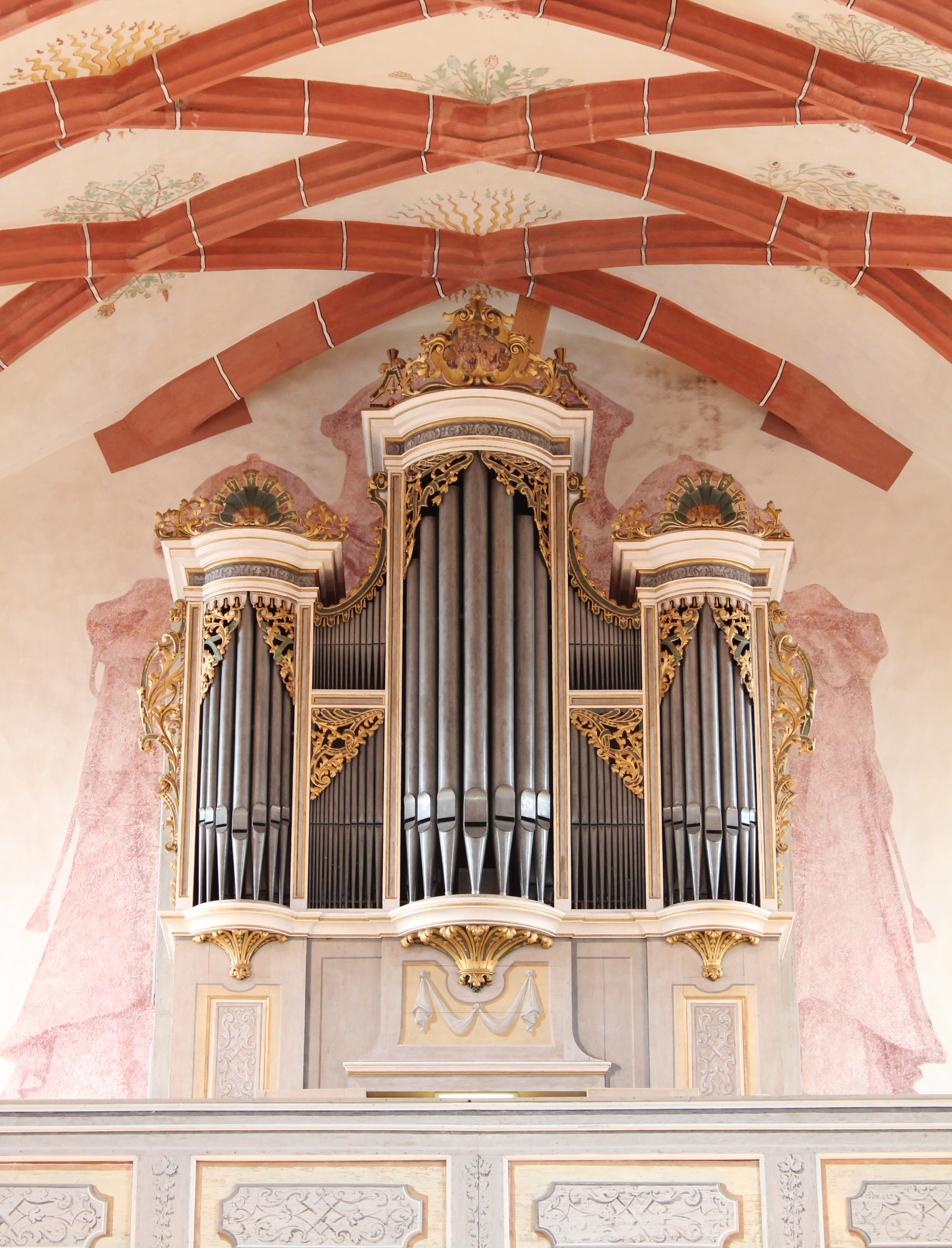 조선말: 뢰타 마리아교회 질버만오르간 1722년 제작